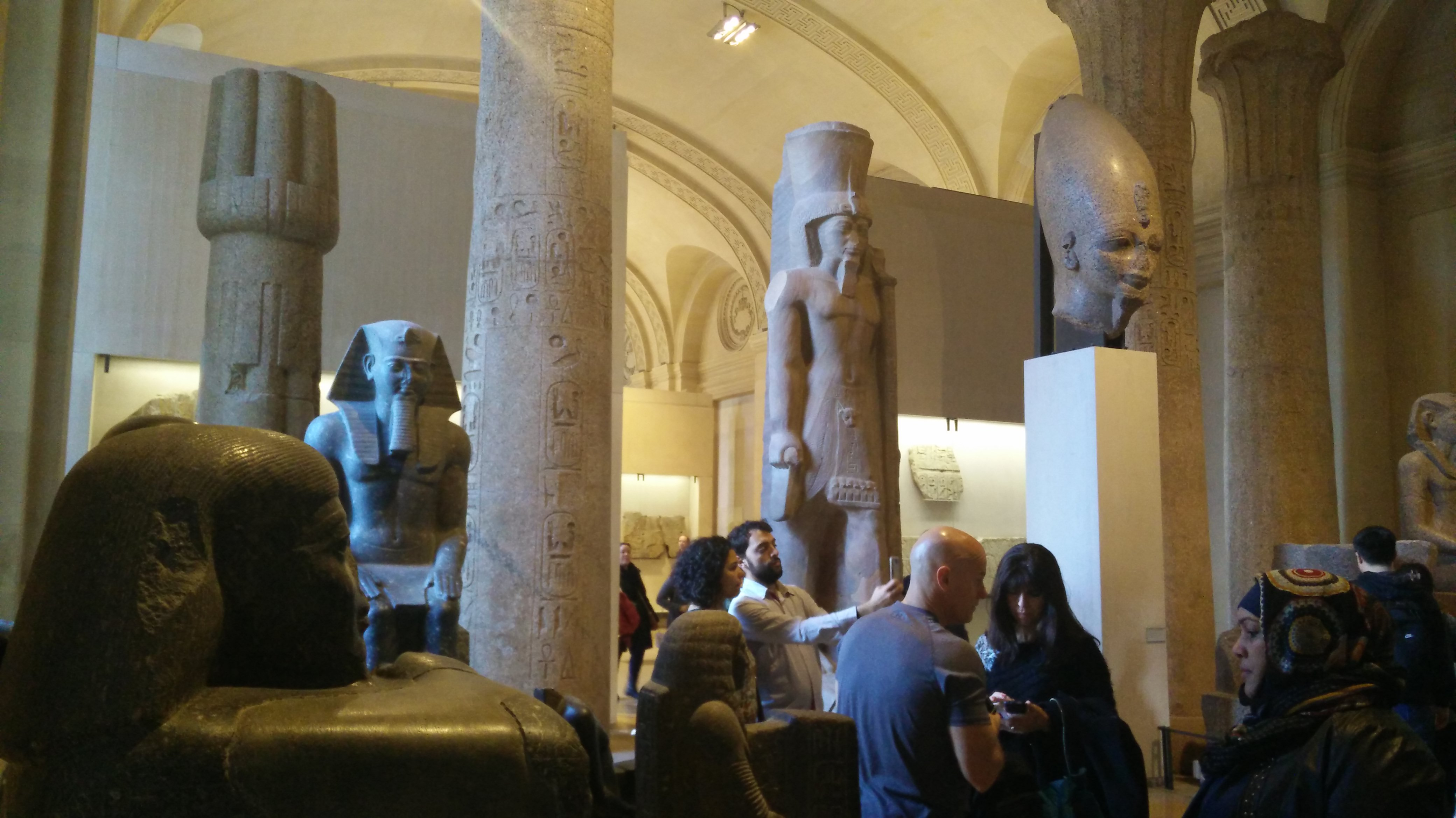 IMG_20141107_131358